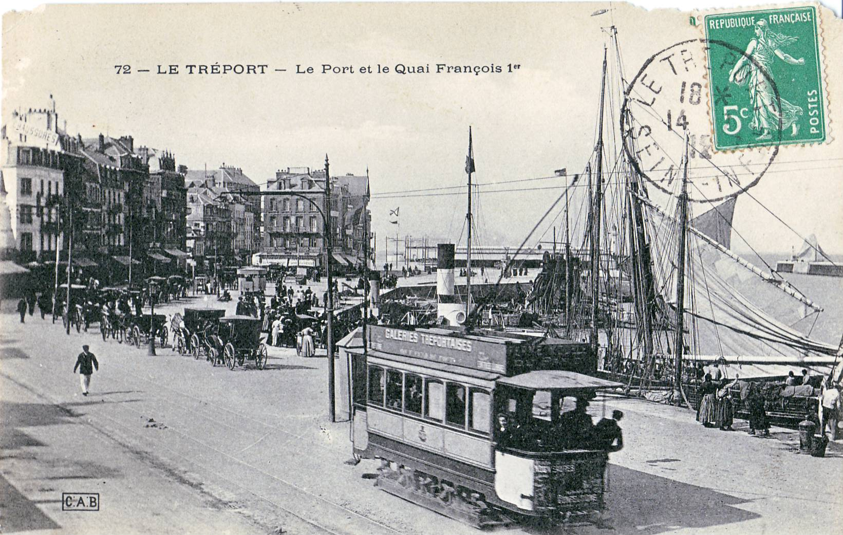 Carte postale ancienne éditée par CAB, n°72 : LE TRÉPORT - Le Port et le Quai François 1er.Vue en gros plan d'une motrice du Tramway d'Eu-Le Tréport-Mers